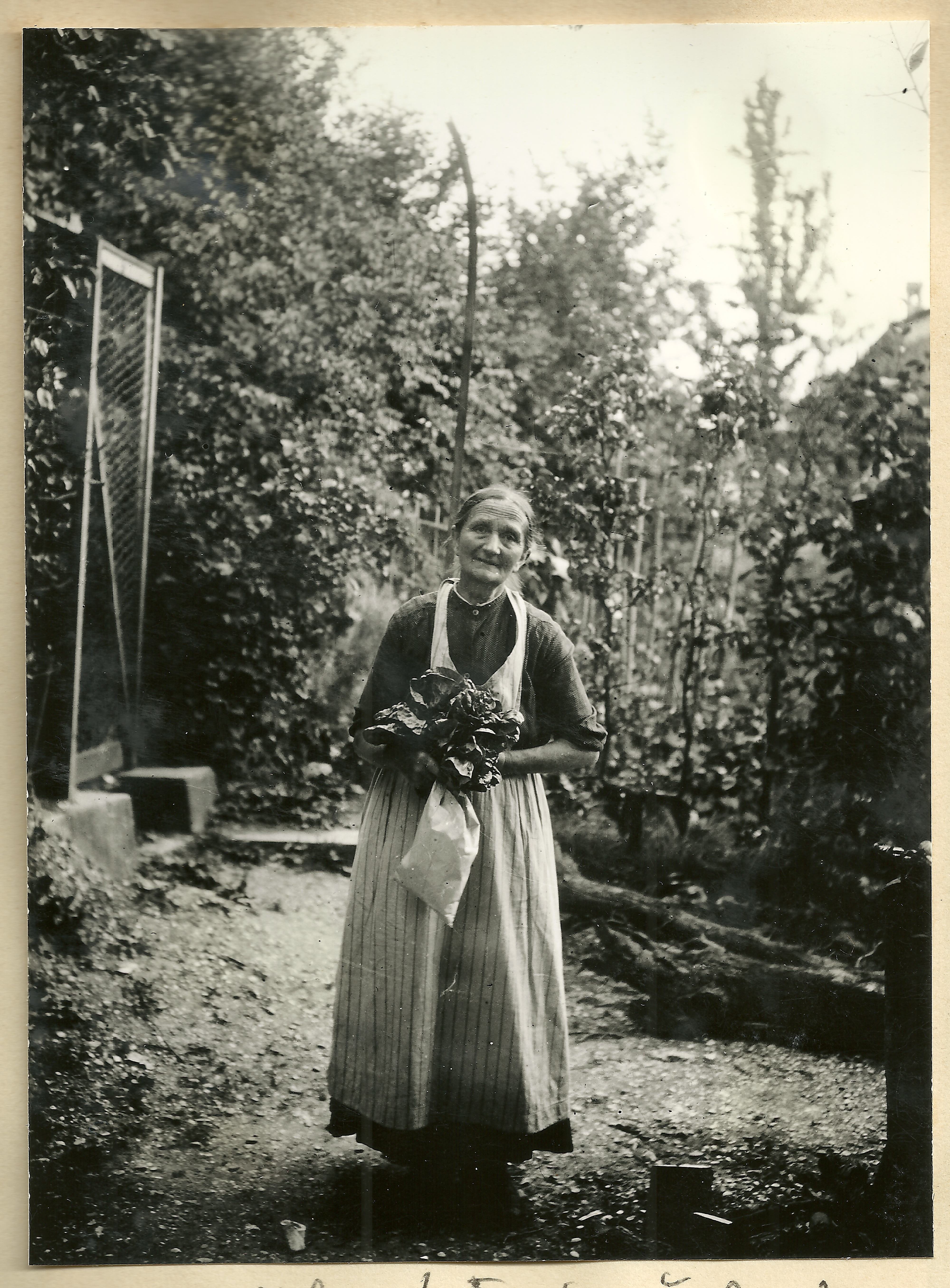 Handschriftlicher Kommentar von Hans Martin Sutermeister: „Unser liebes Lina (Baumberger), das [?] bei uns war & schon die Mutter auf den Armen trug! Zufällig kam sie wieder zu Friedrich Sutermeister (Vater), als er noch Junggeselle war (in Schlossrued).